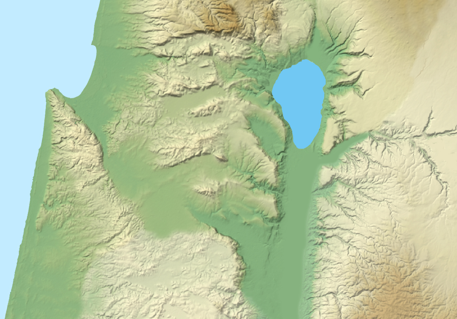 Map of Jezreel Valley, marked in light green in the center